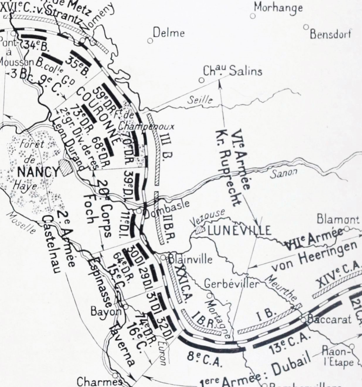 La Bataille du Grand Couronné - Les forces en présence le 24 août This image comes from Gallica Digital Library and is available under the digital ID bpt6k9691147t/f22.image This tag does not indicate the copyright status of the attached work. A normal copyright tag is still required. See Commons:Licensing.